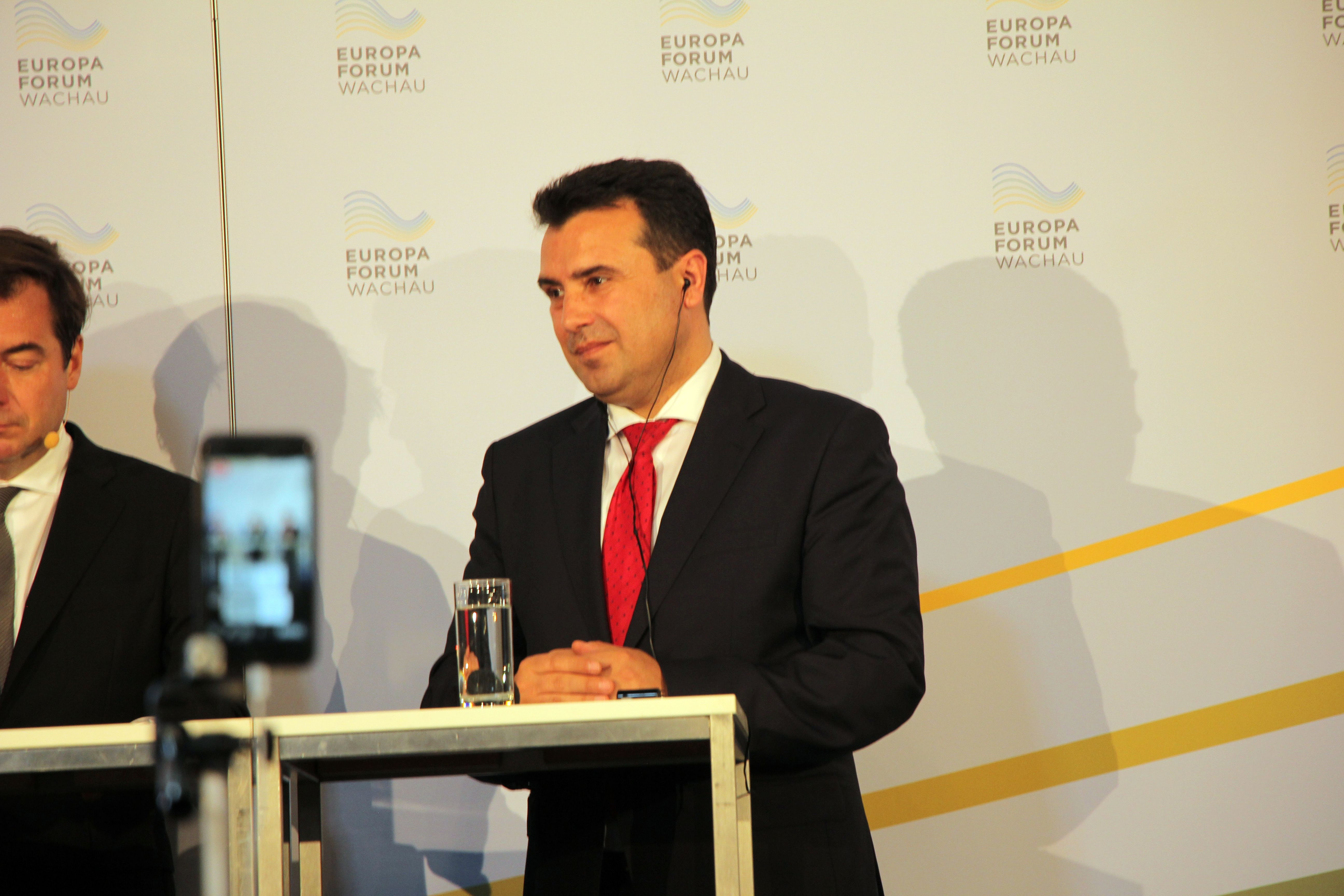 Europaforum Wachau 2019 auf Stift Göttweig